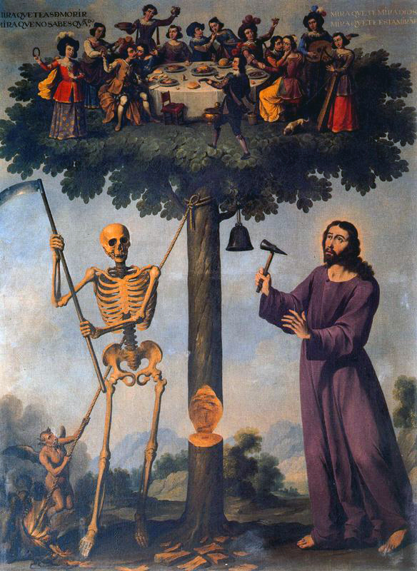 La obra representa El Árbol de la Vida, y a la derecha aparece Jesucristo y a la izquierda un esqueleto como símbolo de la muerte.